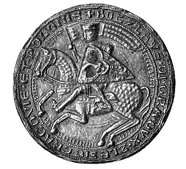 Bolesław I Wysoki falsified seal